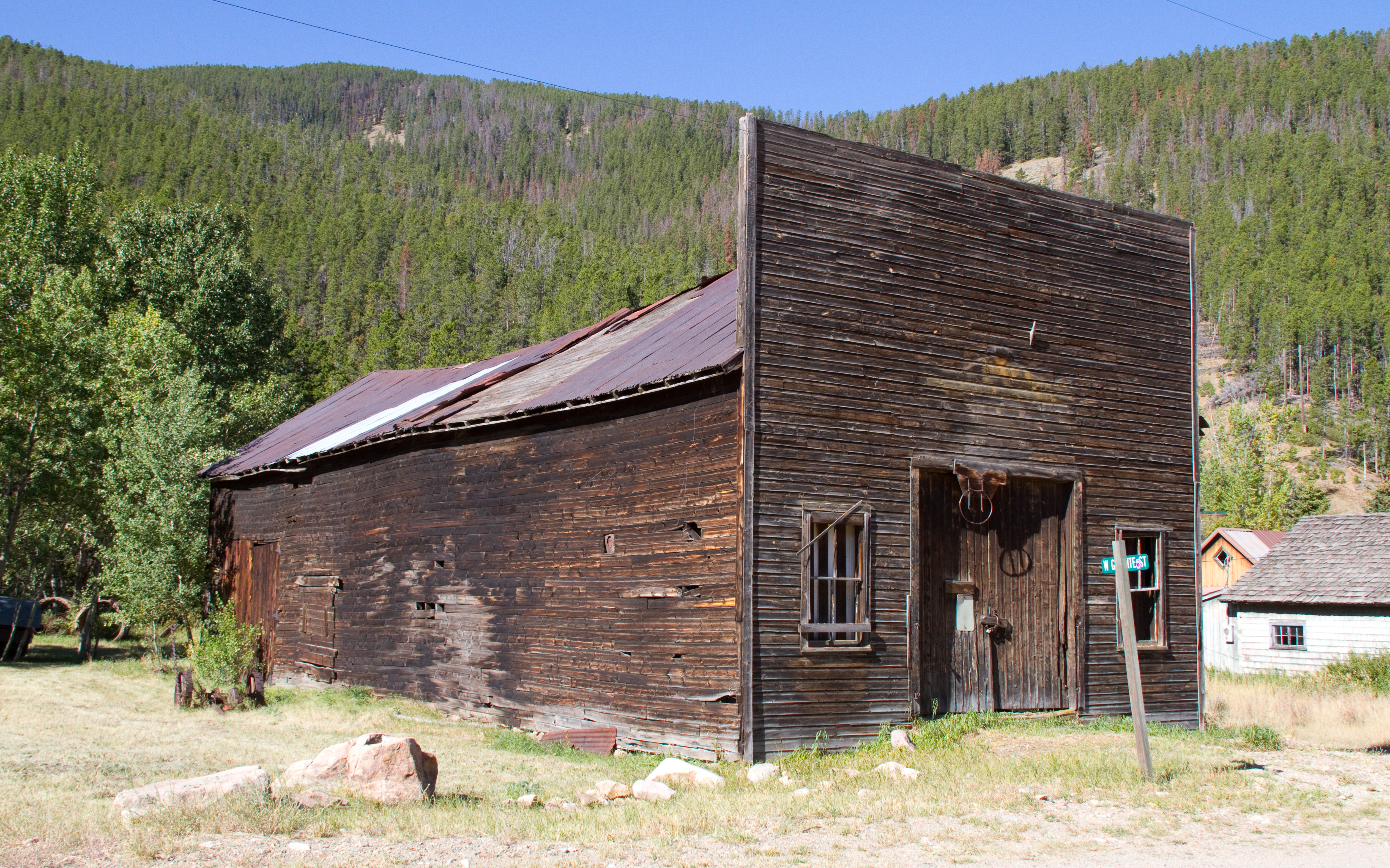 Old Building Neihart